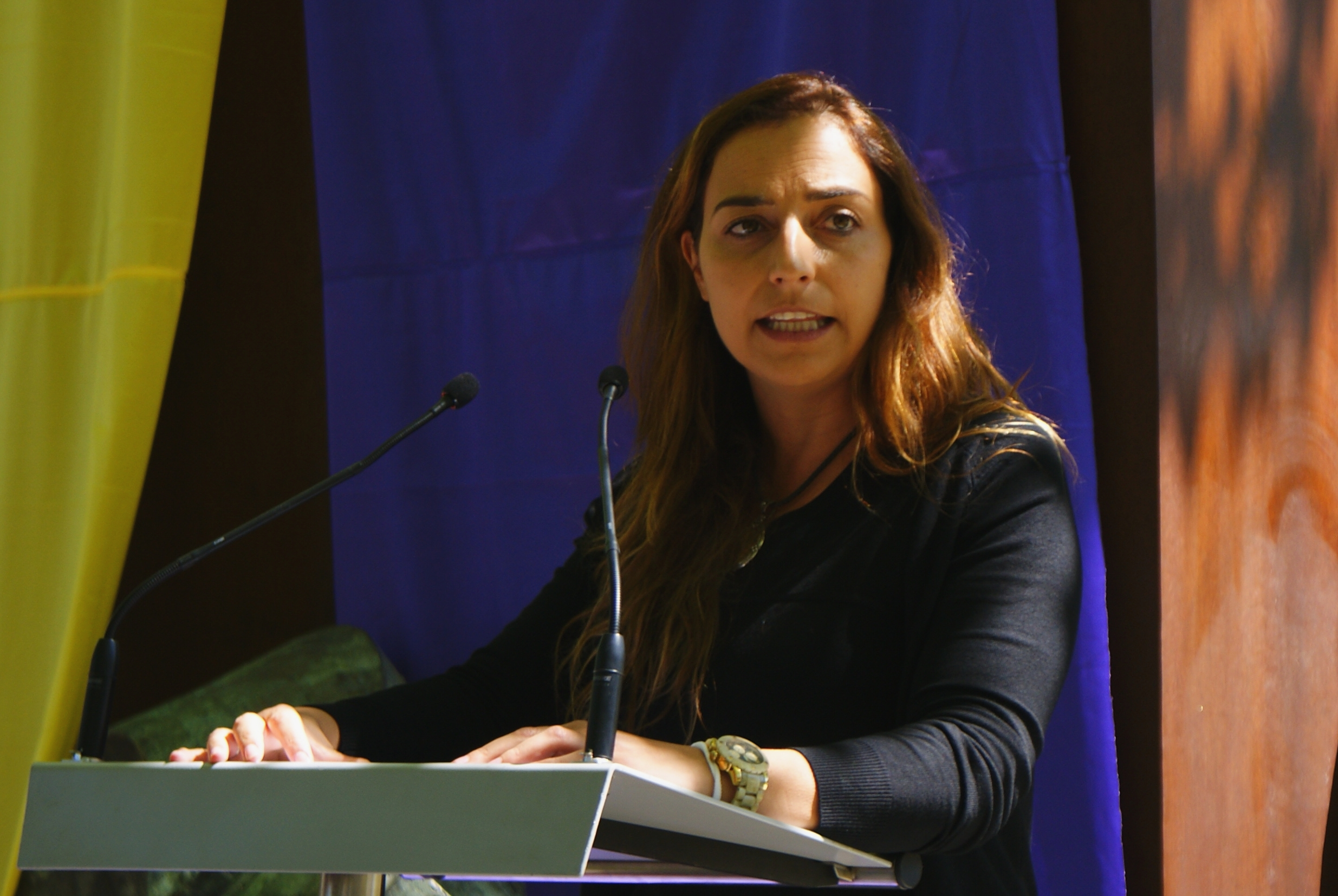 Miriam Andrés, política española del PSOE, senadora por Palencia.